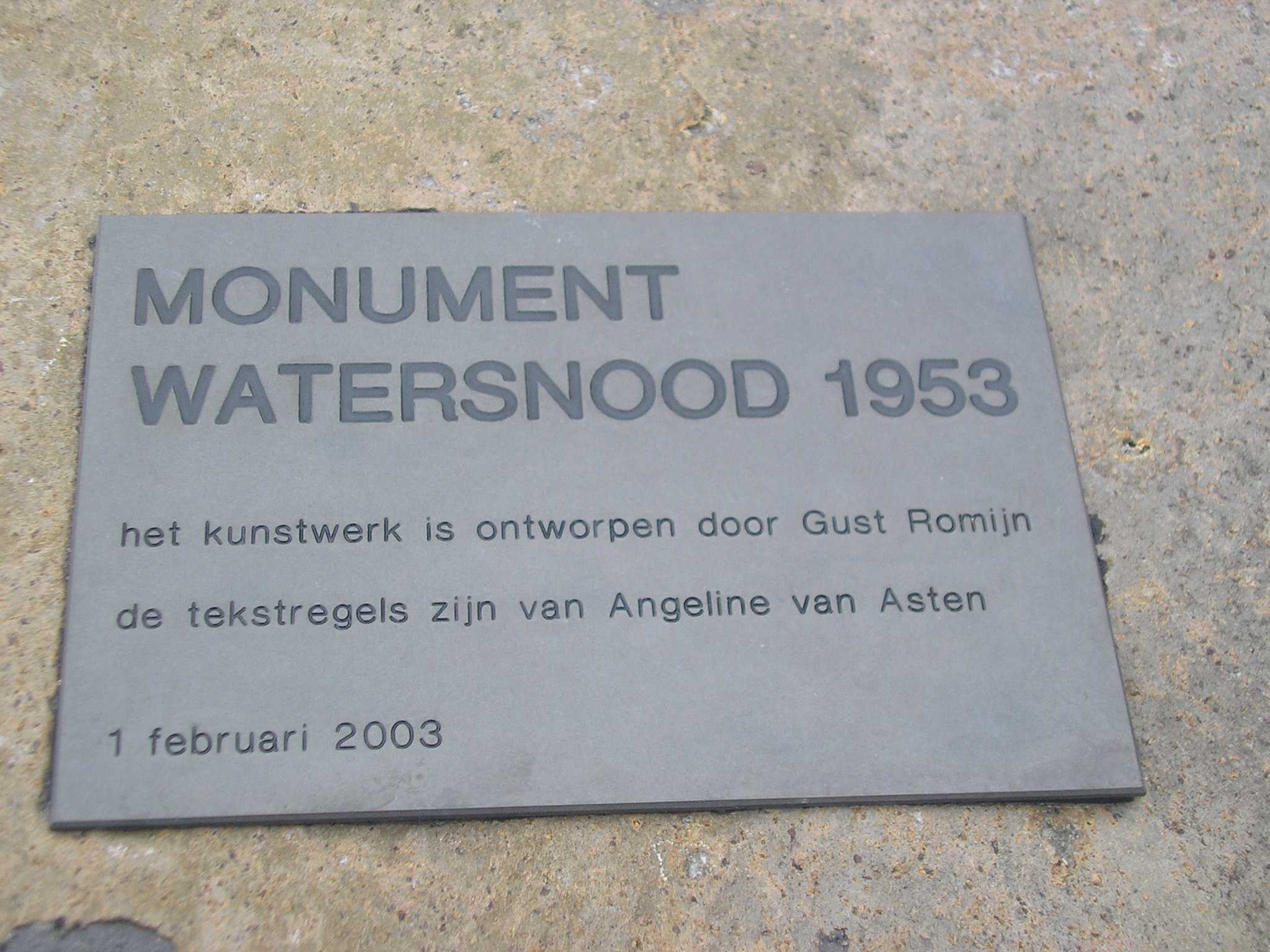 Tekst bij Monument Watersnoodramp 1953 (steen), bij Watersnoodmuseum.